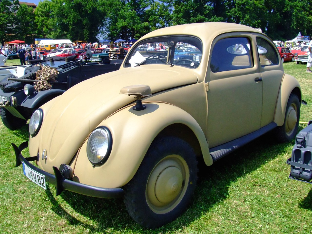 Quelle: selbst fotografiert, 06/2007 Fotograf: Späth Chr.